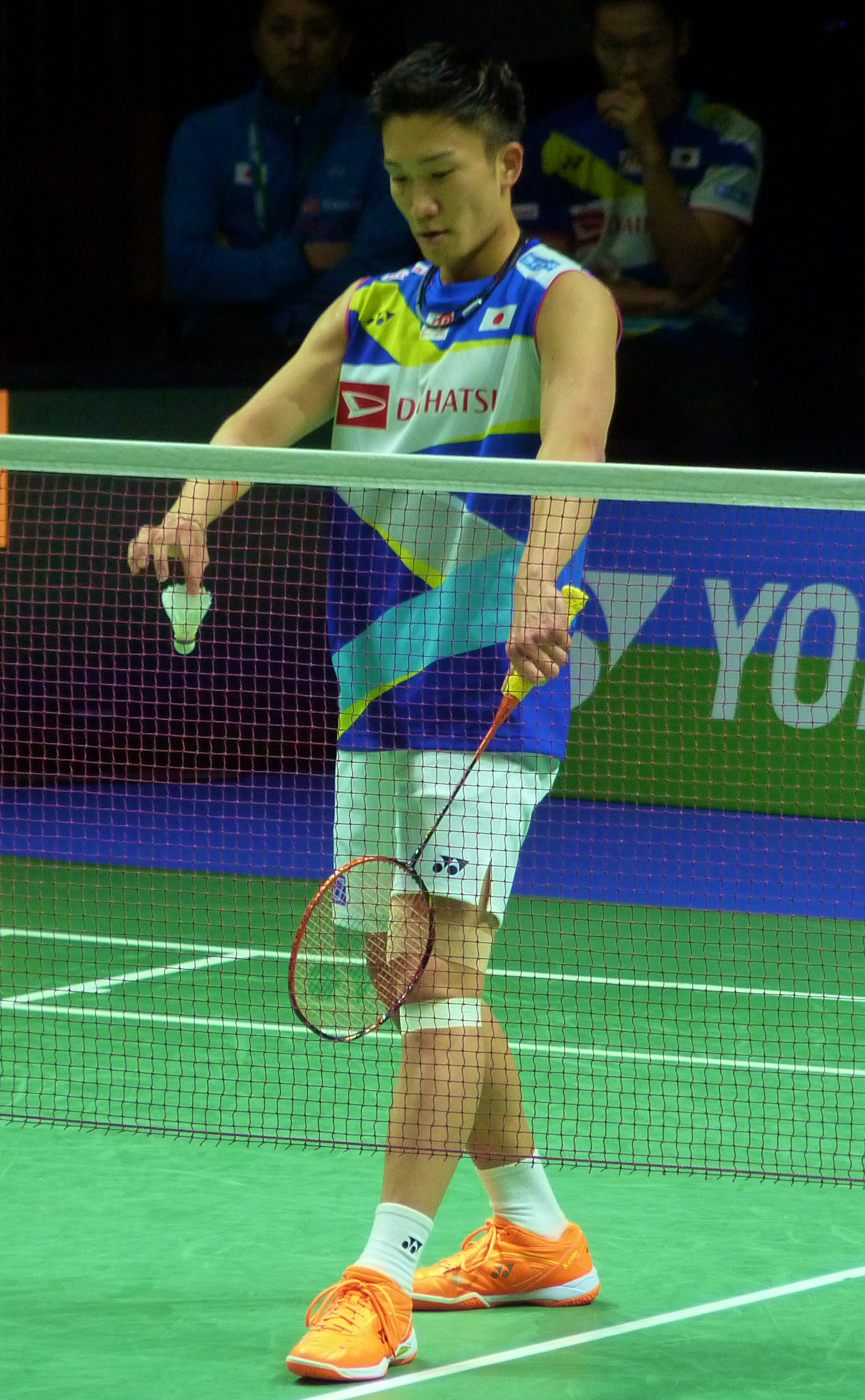 Kento Momota